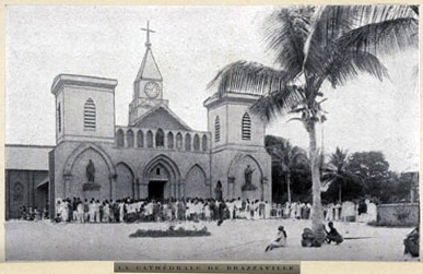 Une vue de la cathédrale de Brazzaville avant 1926, in Monseigneur Augouard de Georges Goyau, page 96 , Bibliothèque de Reims sous la réf : B514546101 X P 0791 P 096 .